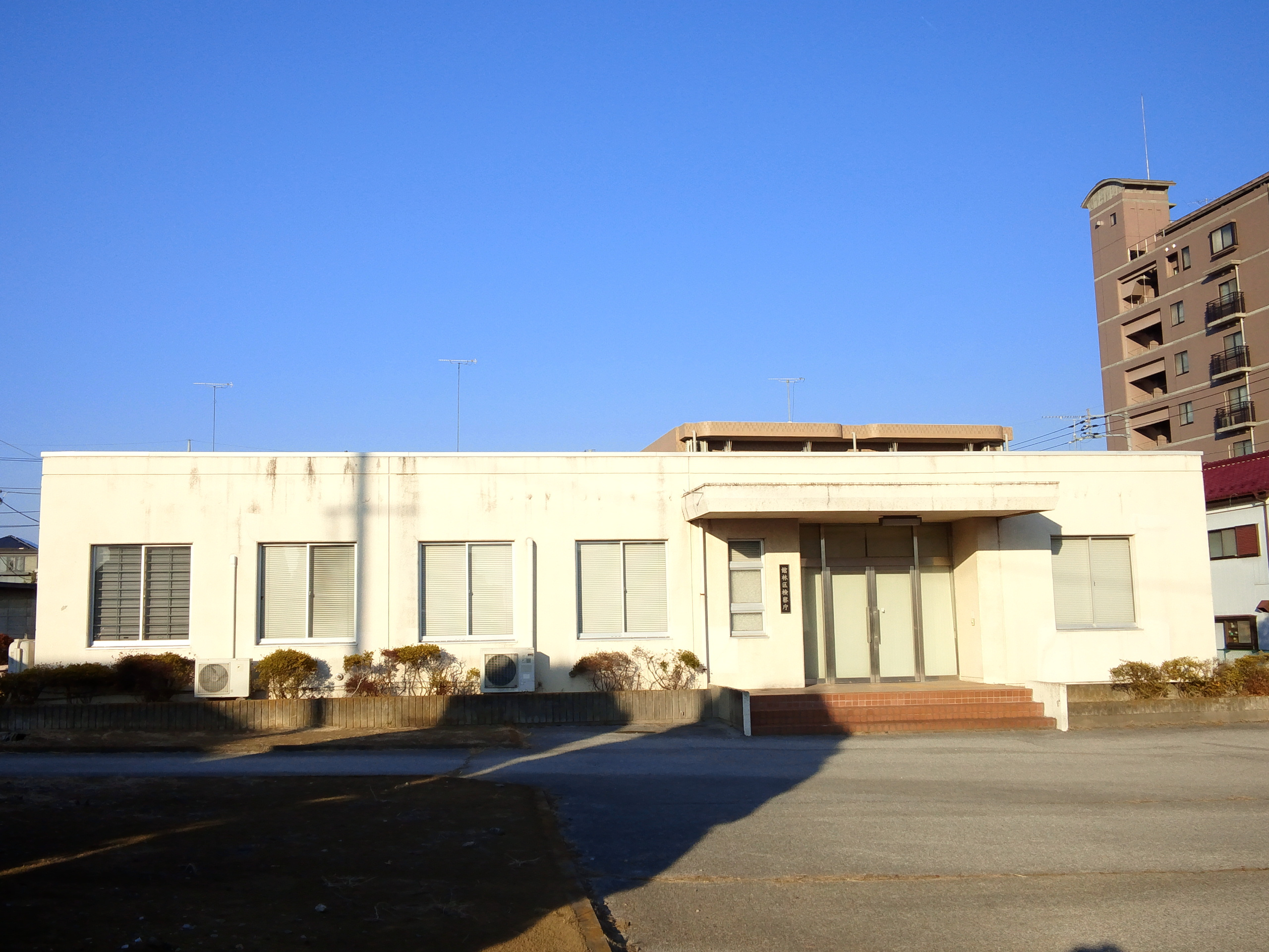 館林区検察庁庁舎